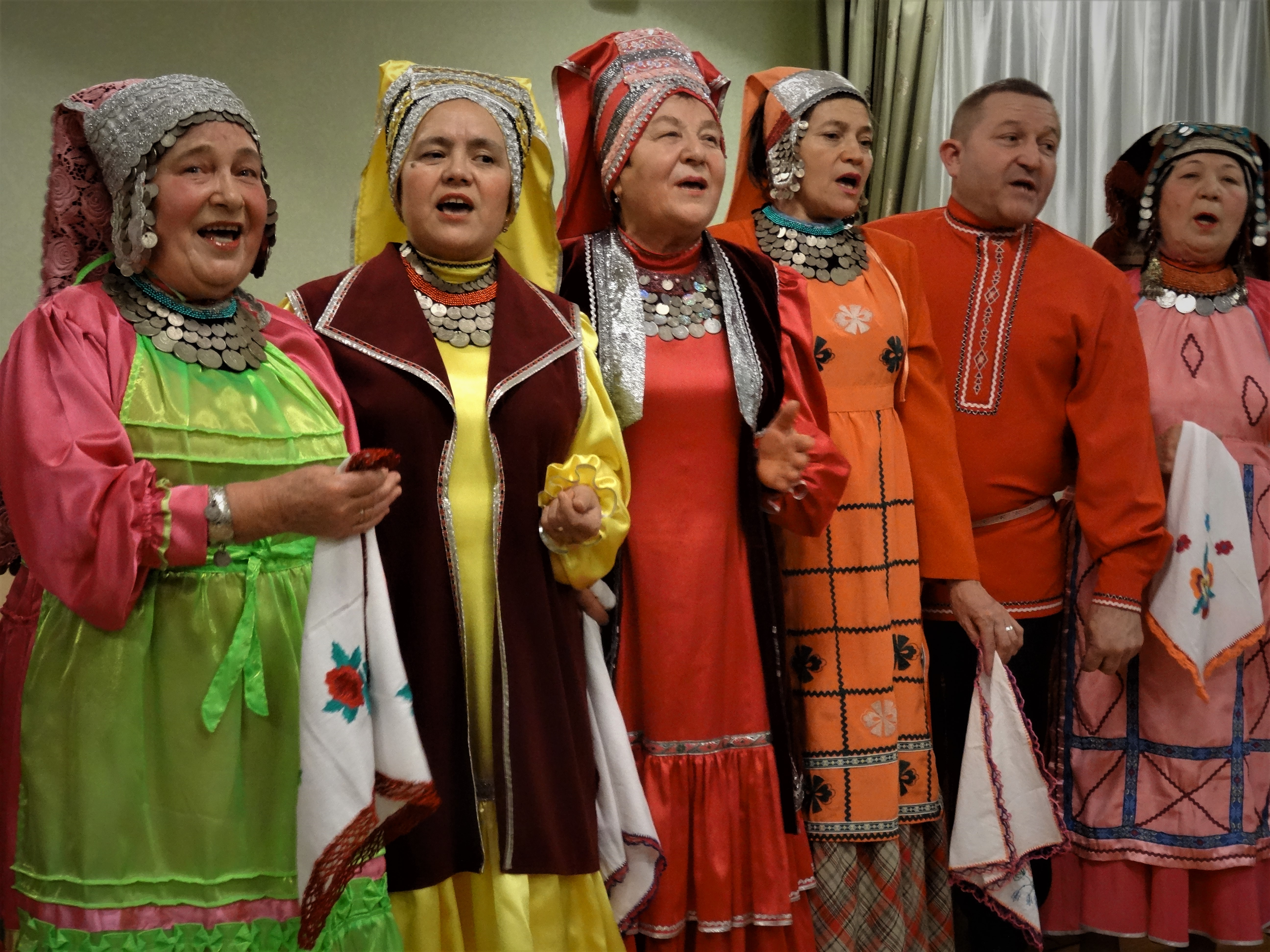 Выступление кряшенского культурного коллектива на презентации фильма «Божий народ – кряшены» (Казань, Дом дружбы народов Татарстана, 10 января 2017 г.).